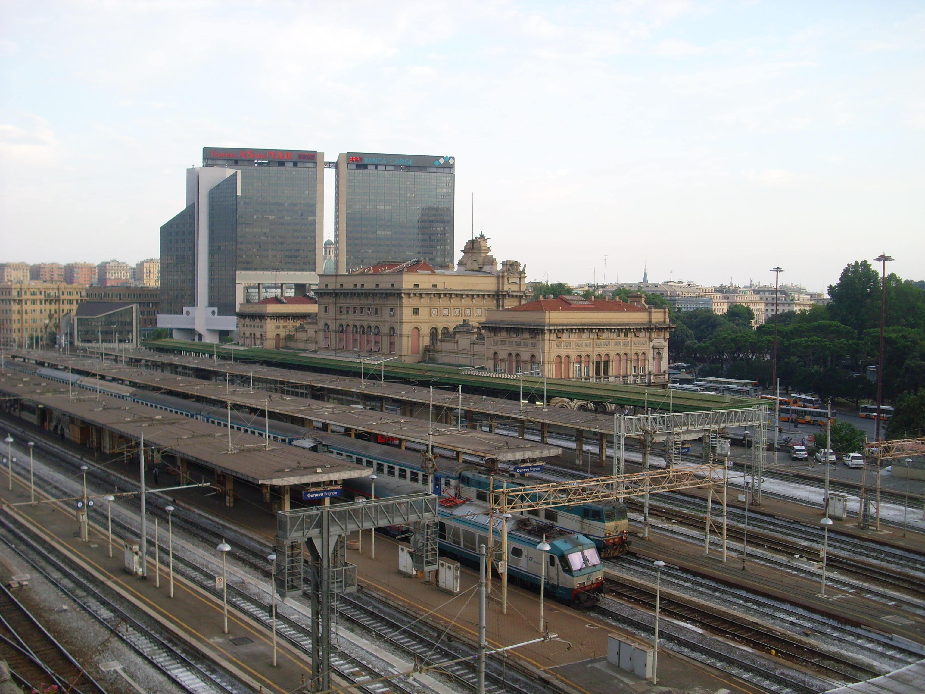 La stazione ferroviaria di Genova Brignole